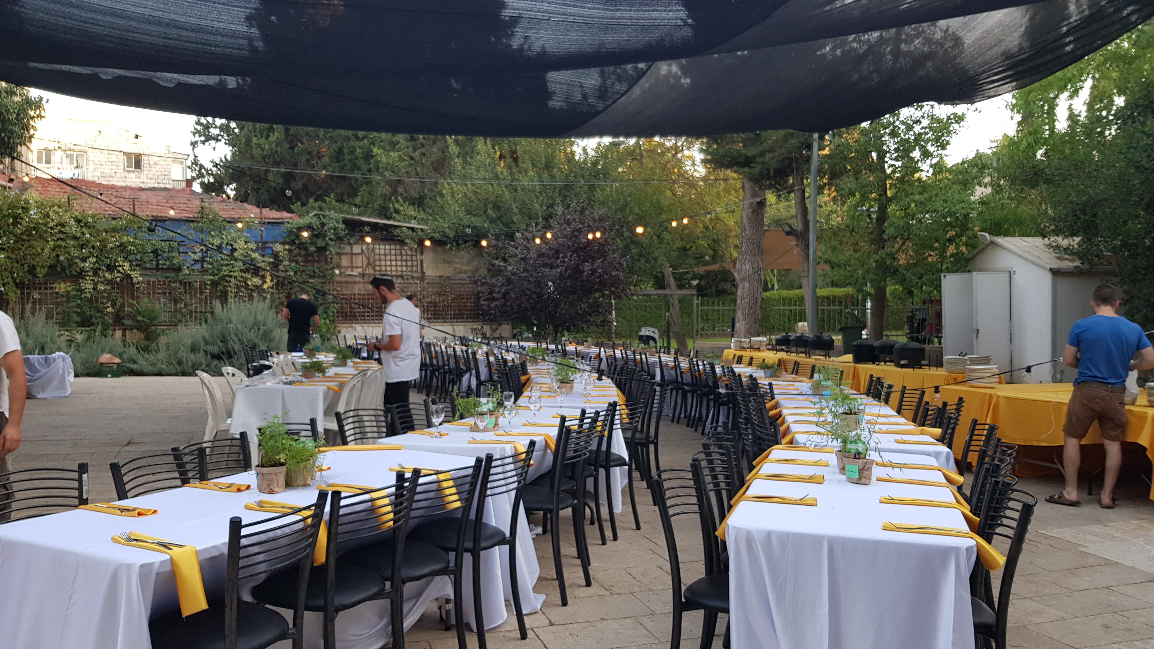 אירוע בחצר בית הכנת חורב